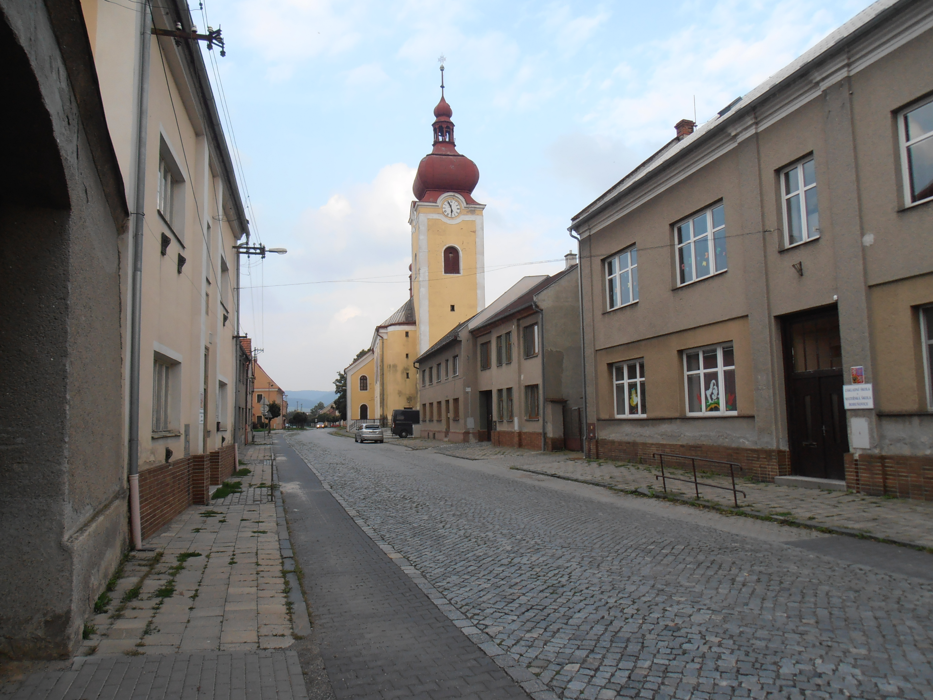 Bohuňovice,vpravo škola